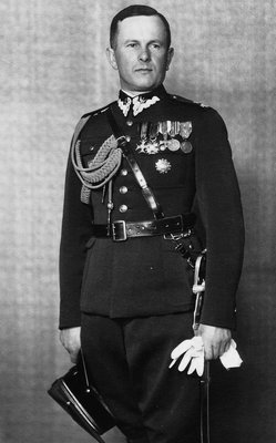 Pułkownik dyplomowany Andrzej Marecki - portret z 1938 lub 1939 roku.